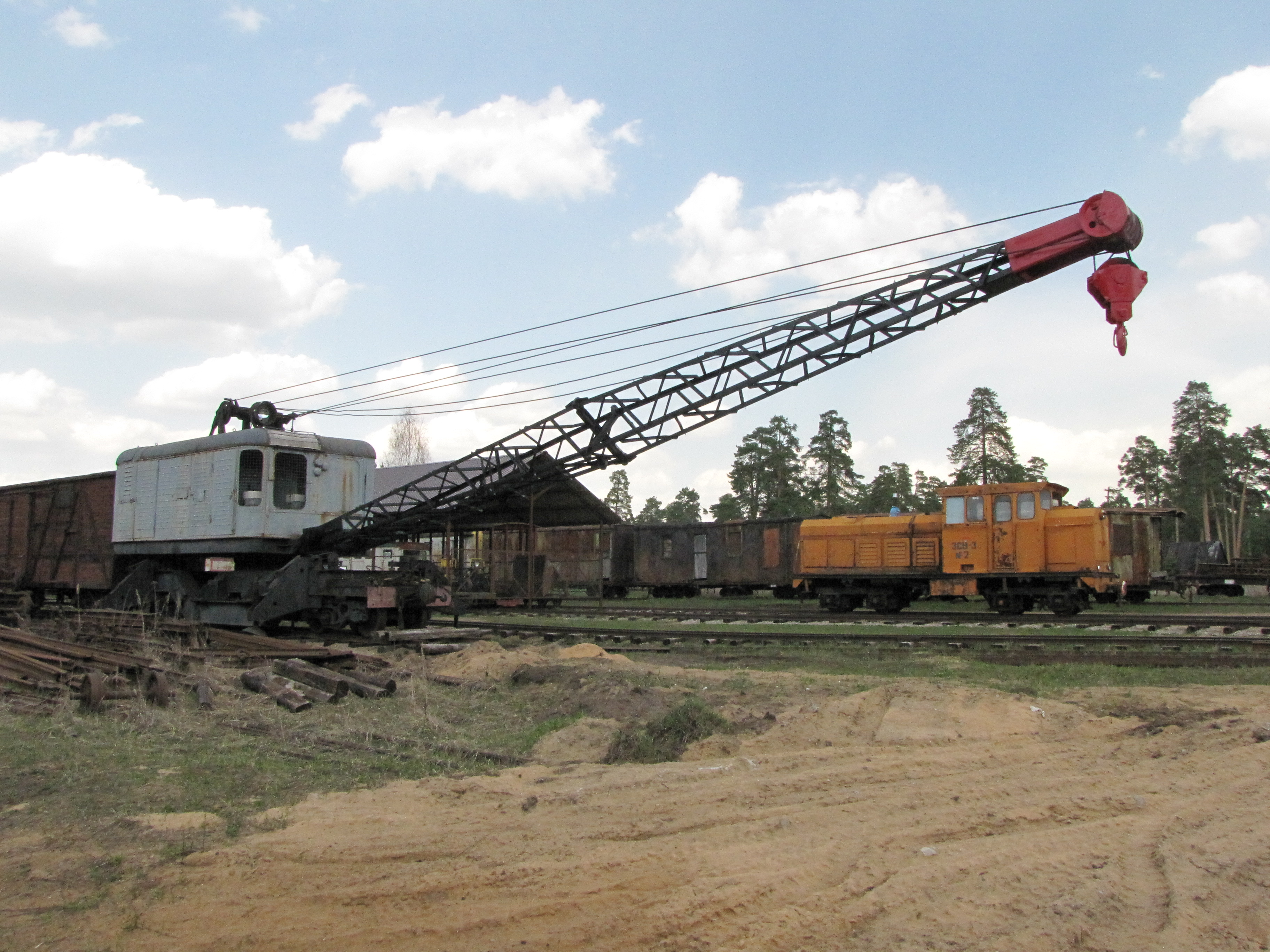 Узкоколейный кран